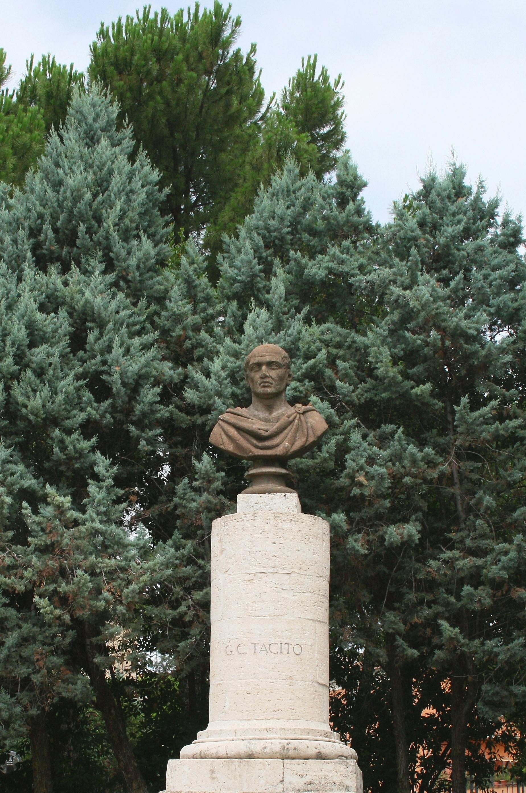 Terni, busto di Gaio Cornelio Tacito.